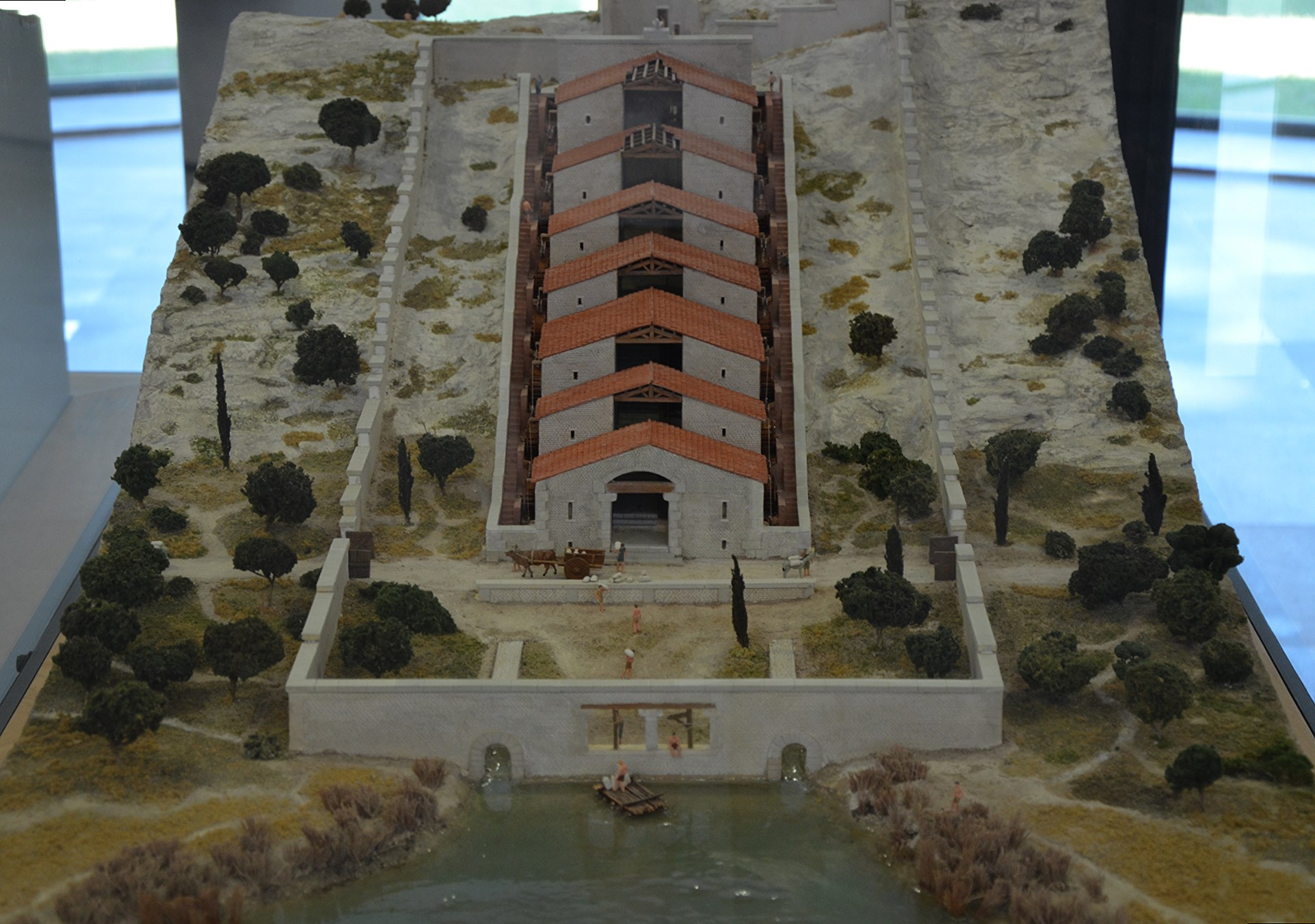 Model of the Barbegal mill, Musée de l'Arles antique